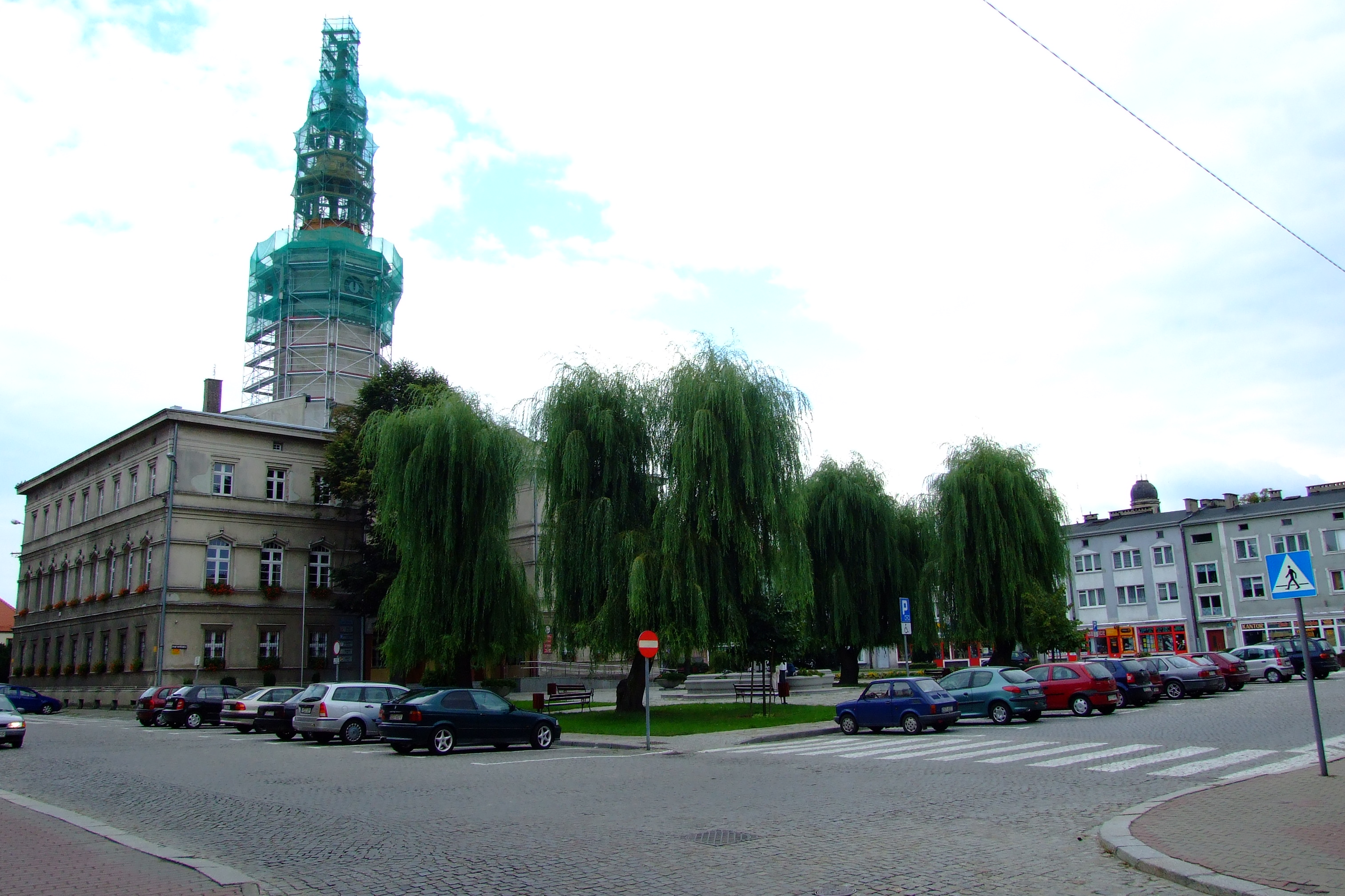 Rynek w Strzelcach Opolskich